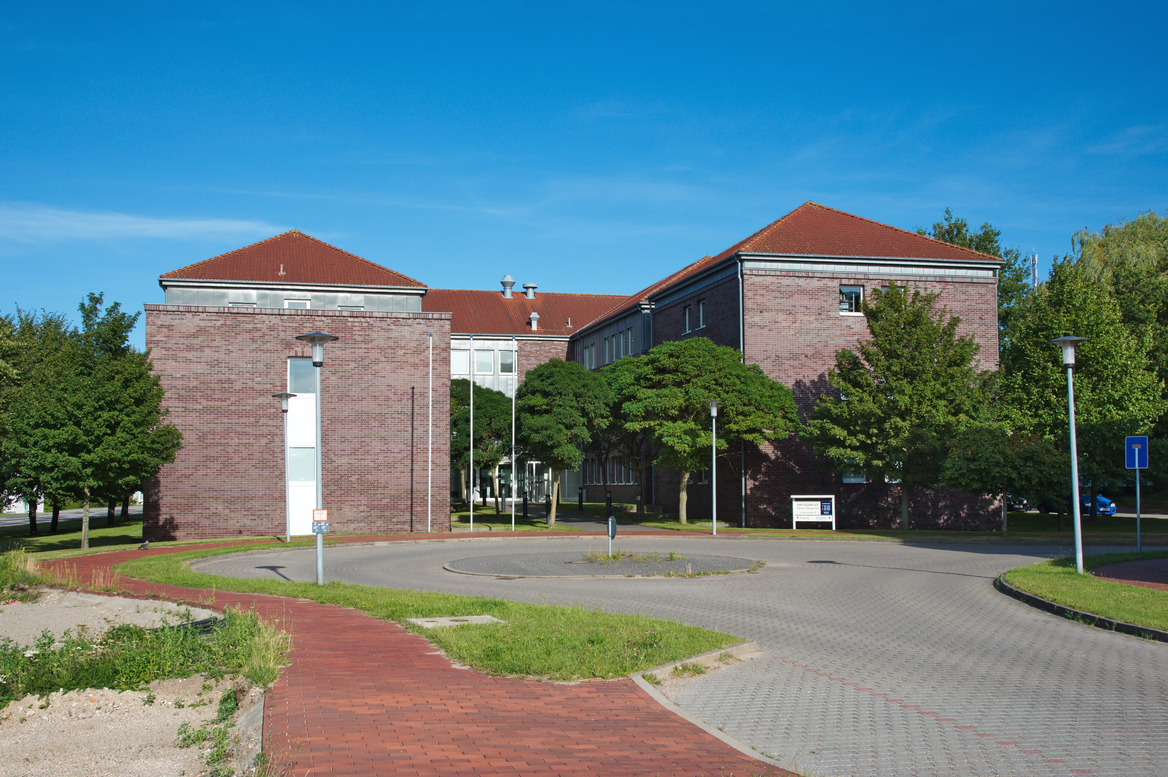 Blick auf das Gebäude des ehemaligen Amtsgerichtes Ribnitz-Damgarten.